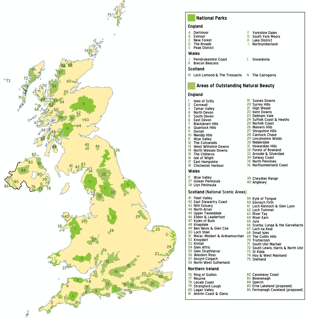 UK_parks